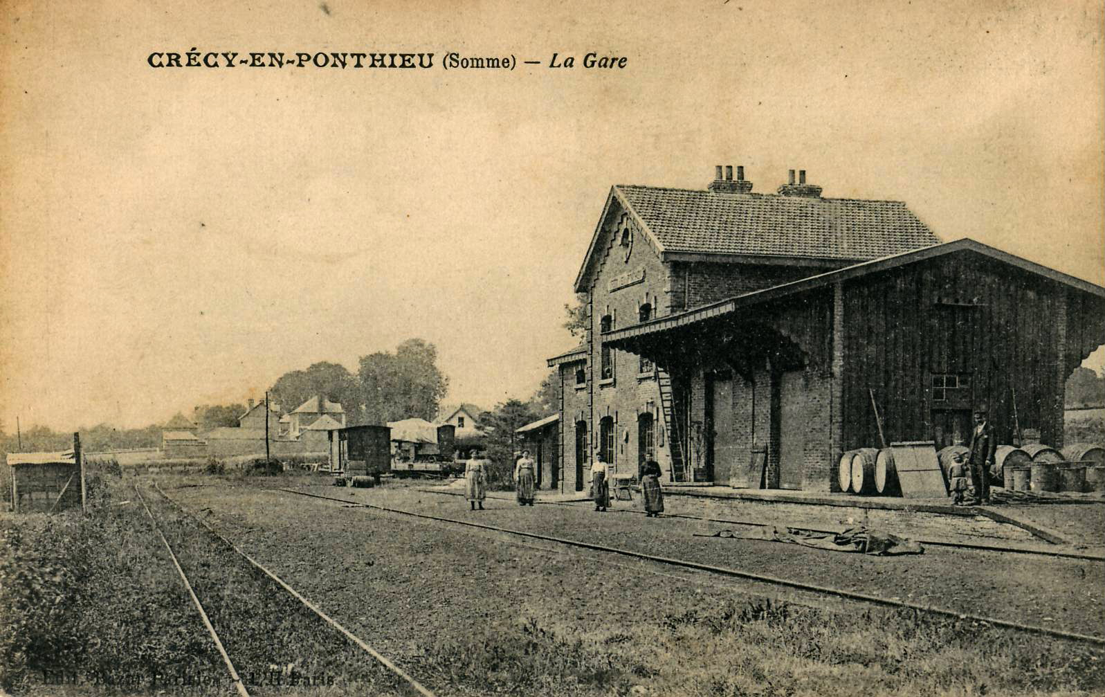 Carte postale ancienne éditée par Editions Bazar parisien - L'H. Paris :CRÉCY-EN-PONTHIEU - La Gare(Chemins de fer départementaux de la Somme - ligne Abbeville - Dompierre (Groupe des Bains de Mer)